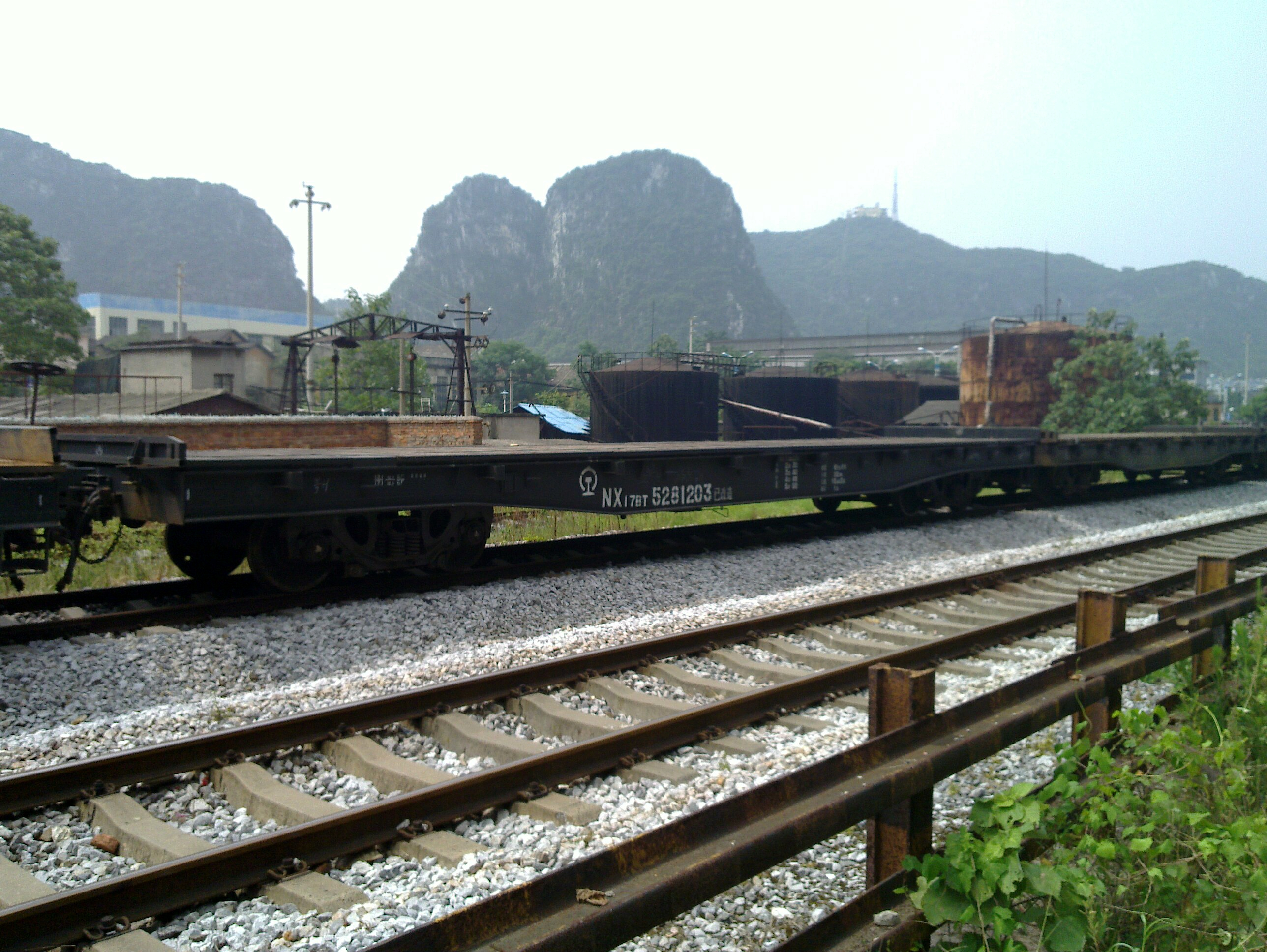 一节NX17BT平车停放在桂林南站